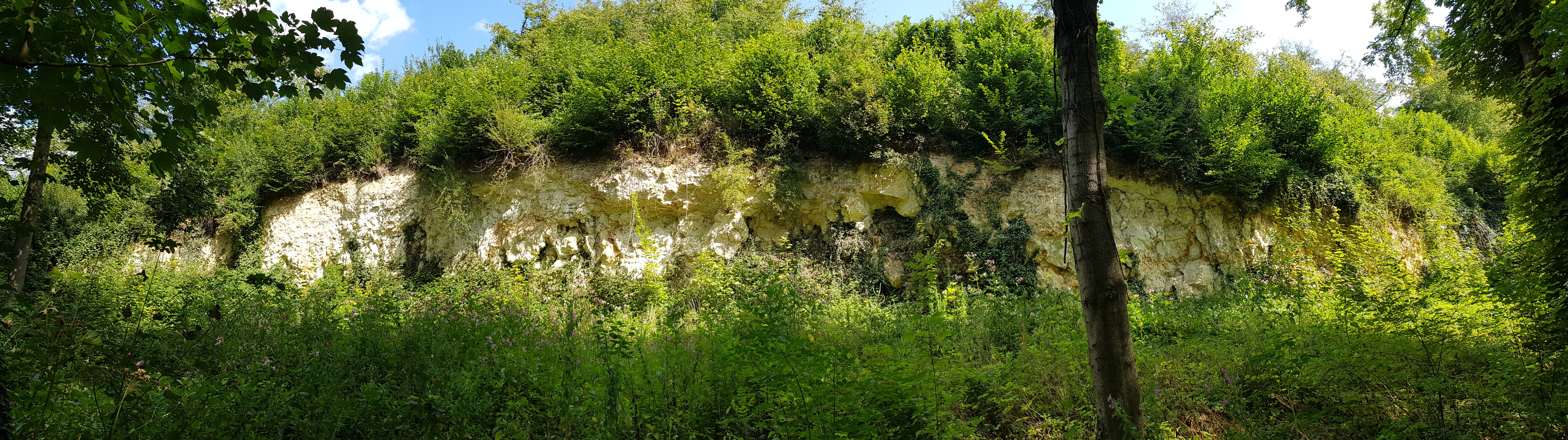 Groeve Kasteel Oost, Valkenburg, Limburg, Nederland